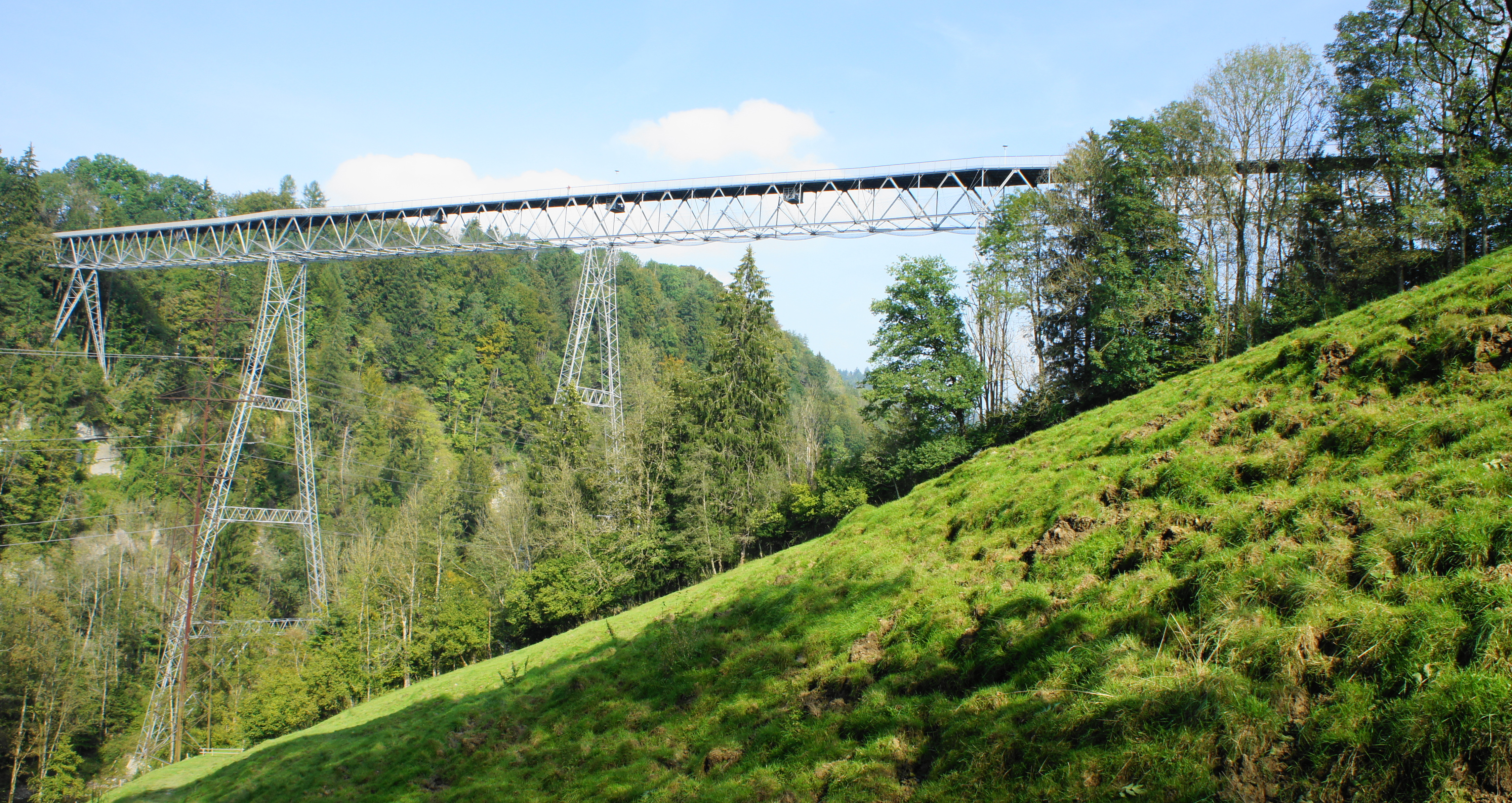 Eisensteg Zweibruggen, Sicht von Westen, Standort ca. halbe Höhe